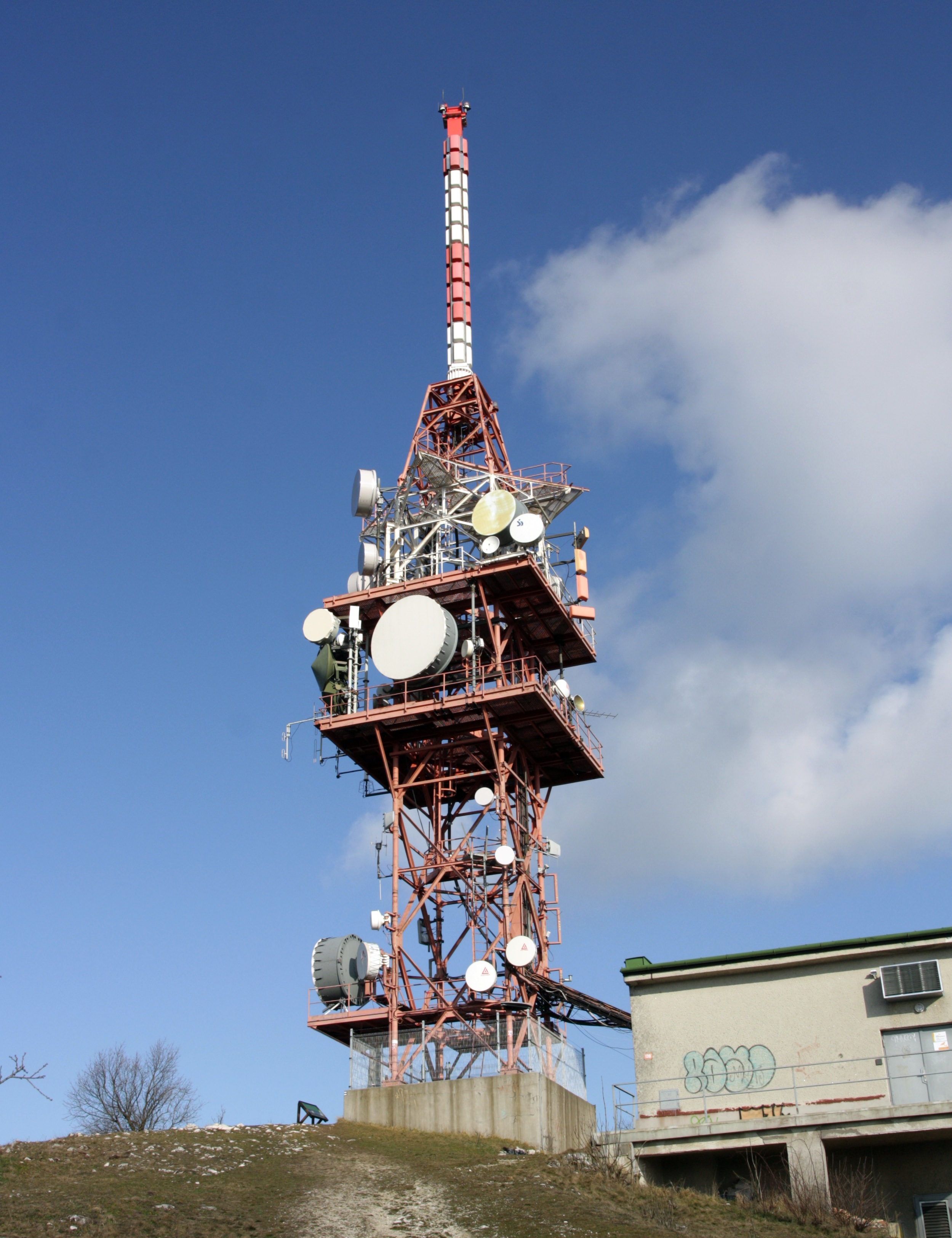 Televizní vysílač na vrchu Děvín, Pavlovské vrchy.